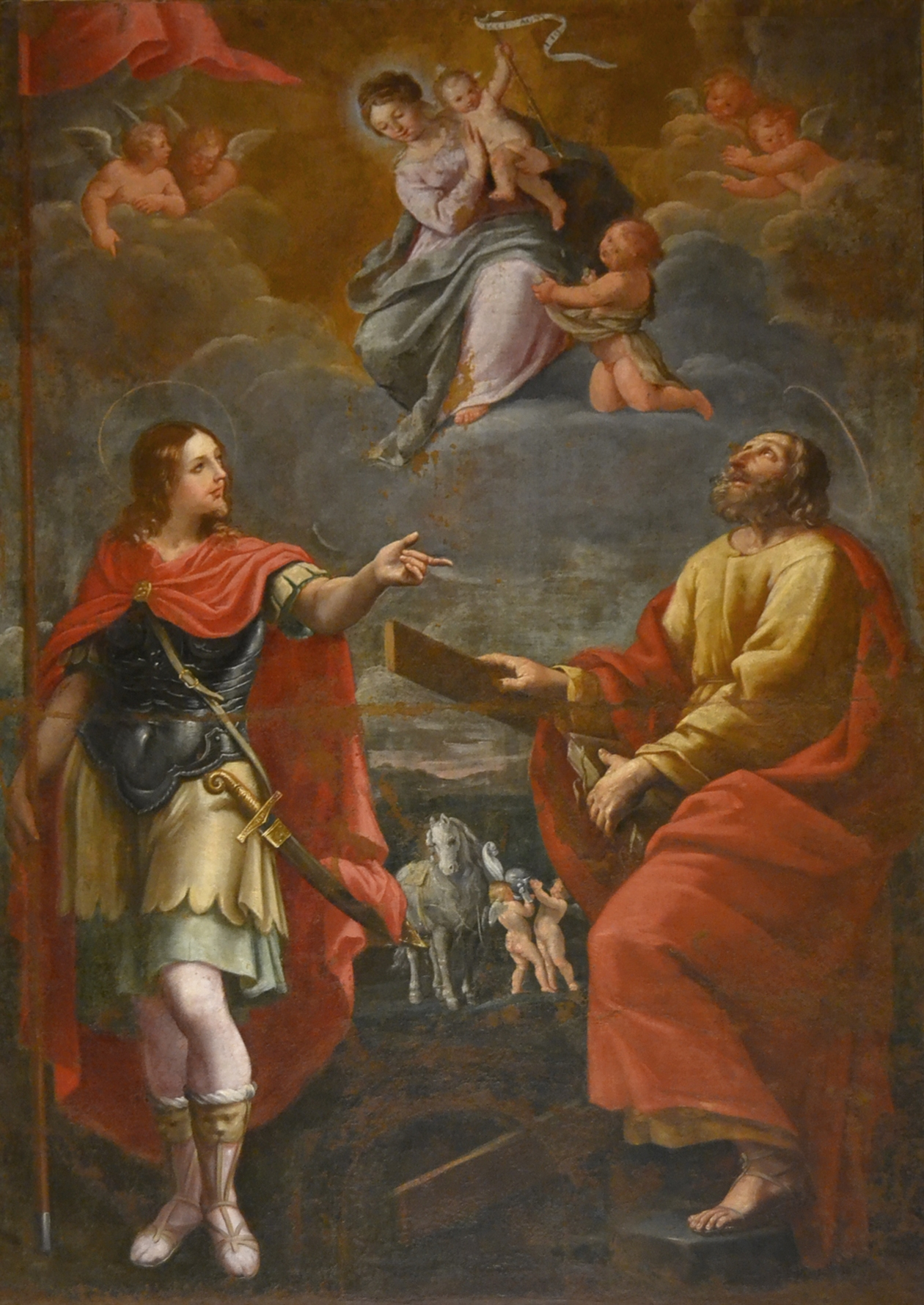 Dipinto su tela raffigurante i santi Vitale e Andrea adoranti la Vergine con il Bambino e san Giovannino conservato a Granarolo